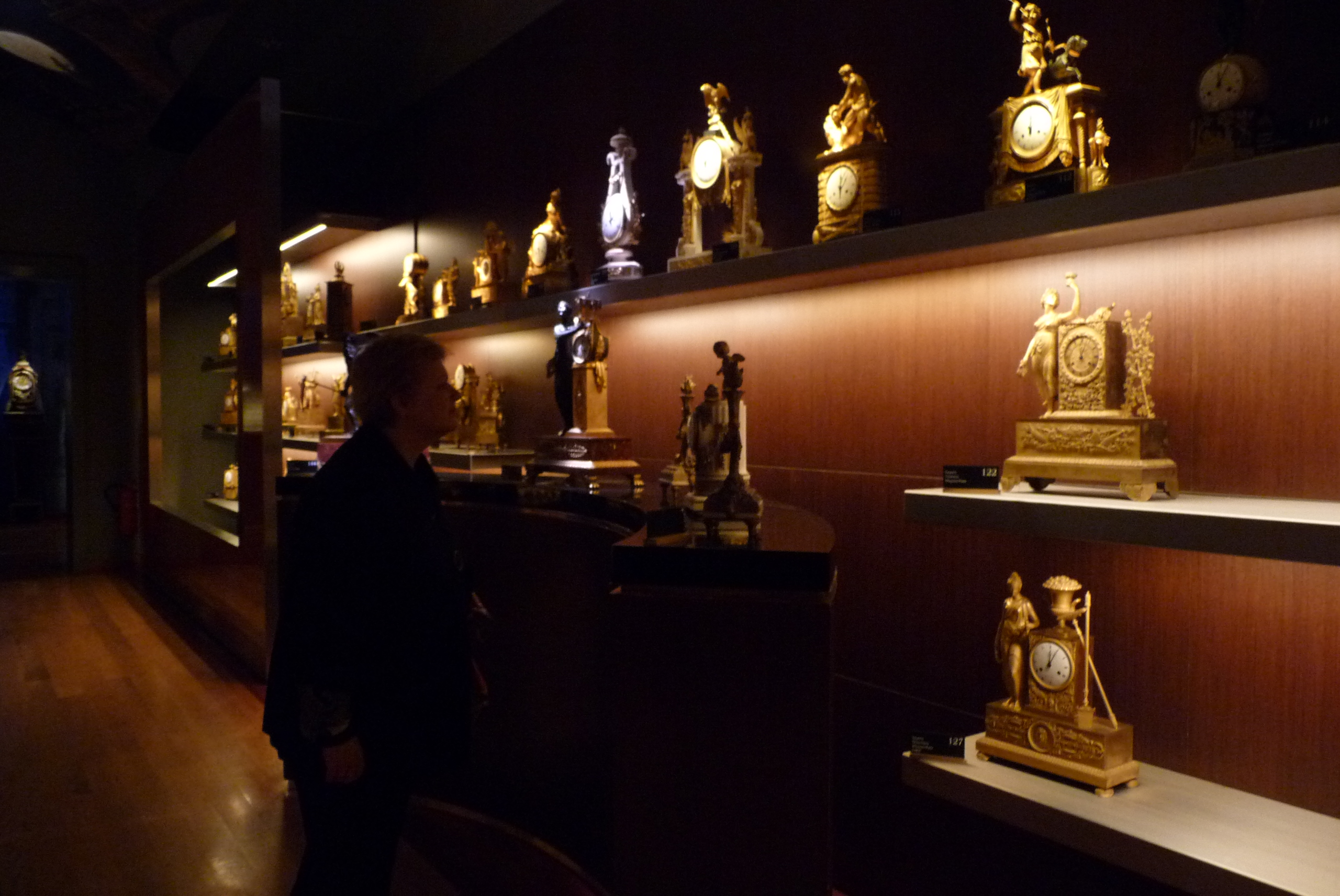 Clock museum. Jerez de la Frontera (Andalusia, Spain)